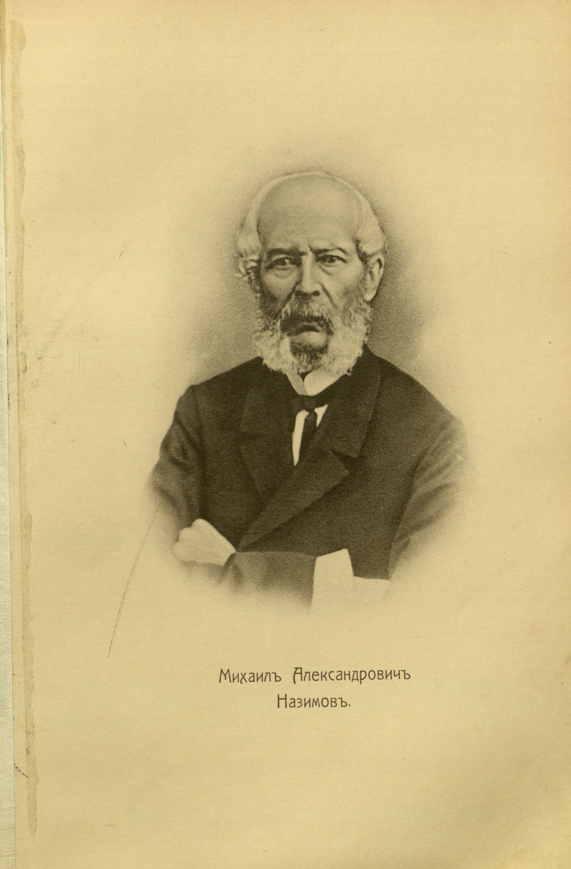 Назимов, Михаил Александрович